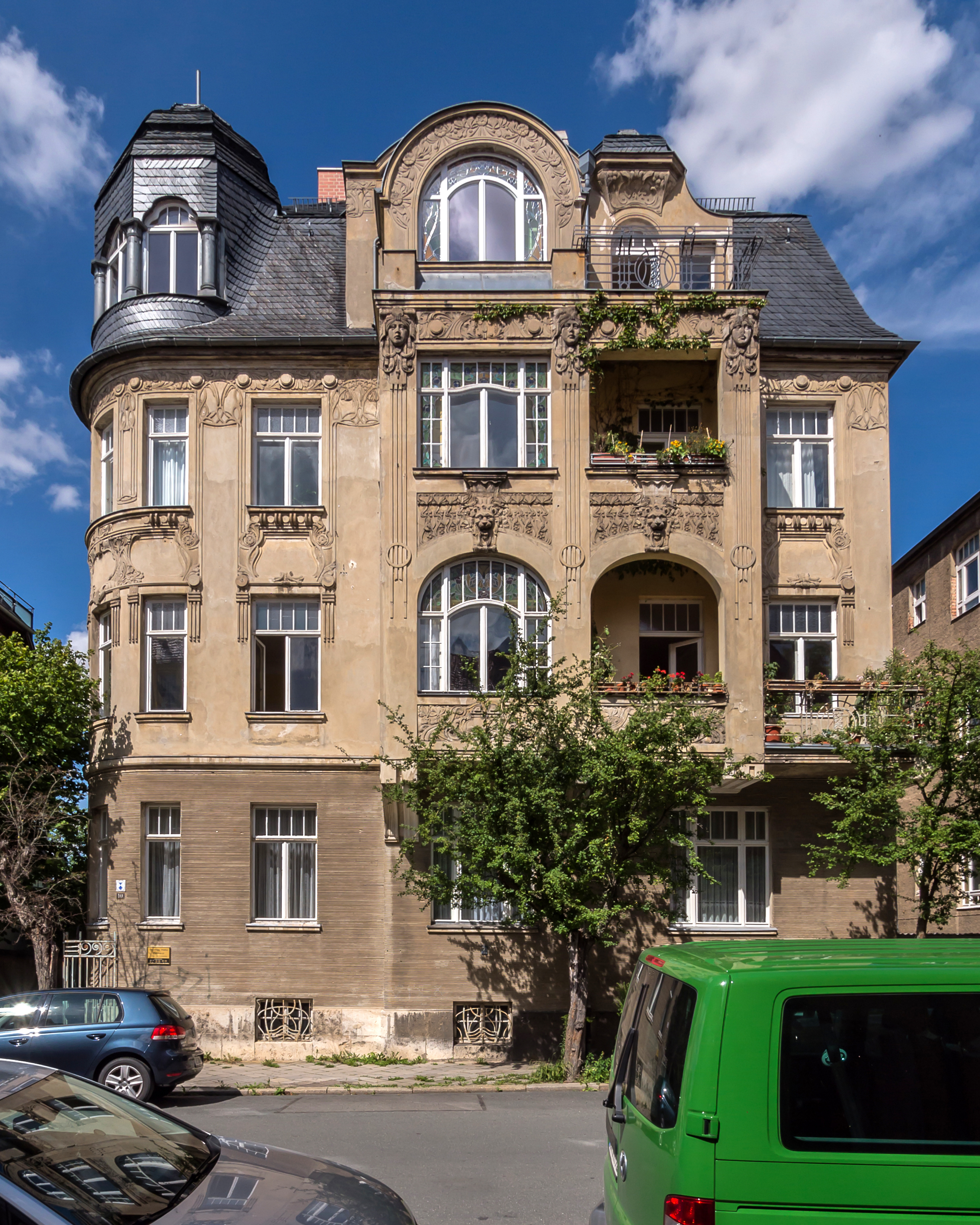 Weimar, Cranachstraße 10, Wohnhaus